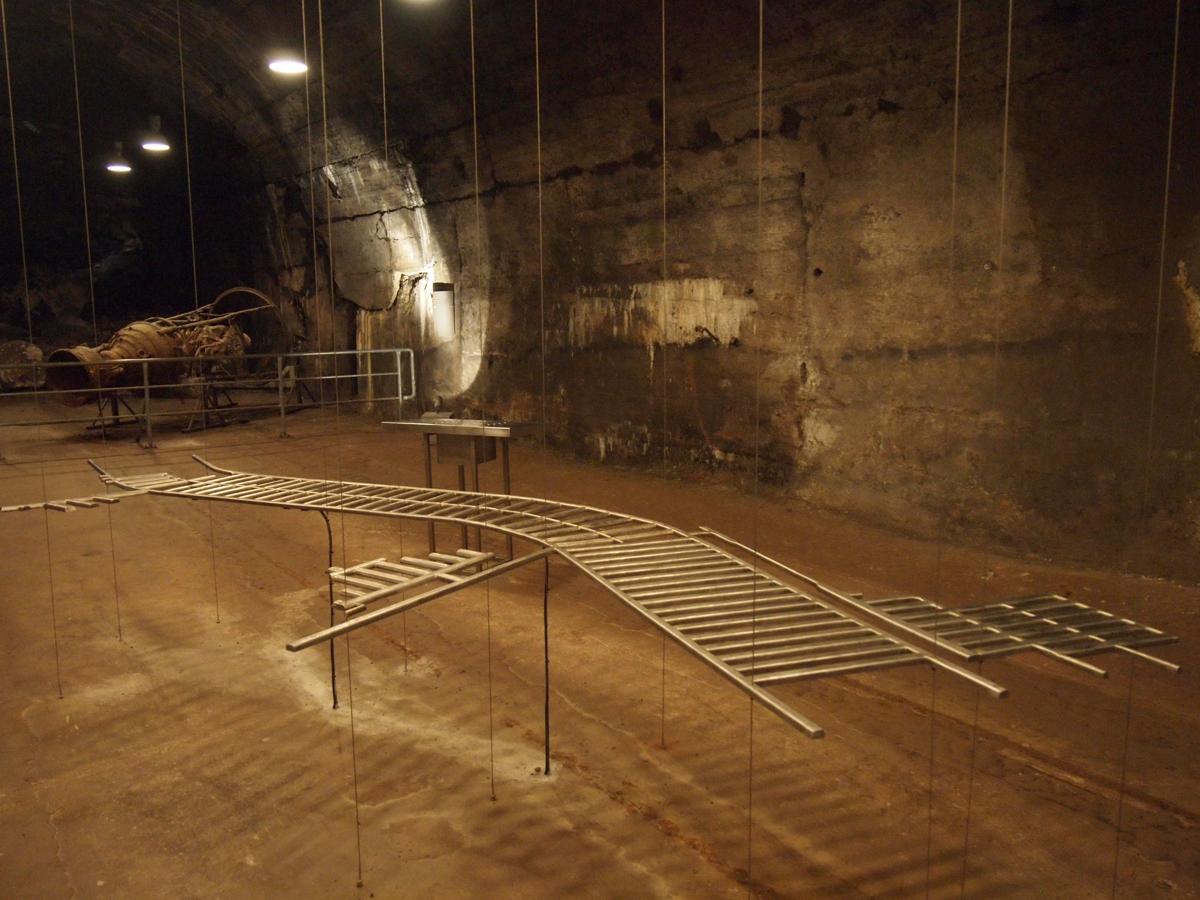 Mittelbau Dora, Edelstahlmodell der Stollen im rechten Hauptstollen. Der Standort ist im Modell ganz links oben. Im Hintergrund rostet ein vor Ort produziertes und dort verbliebenes Teil einer V2-Rakete auf einem Gestell vor sich hin.